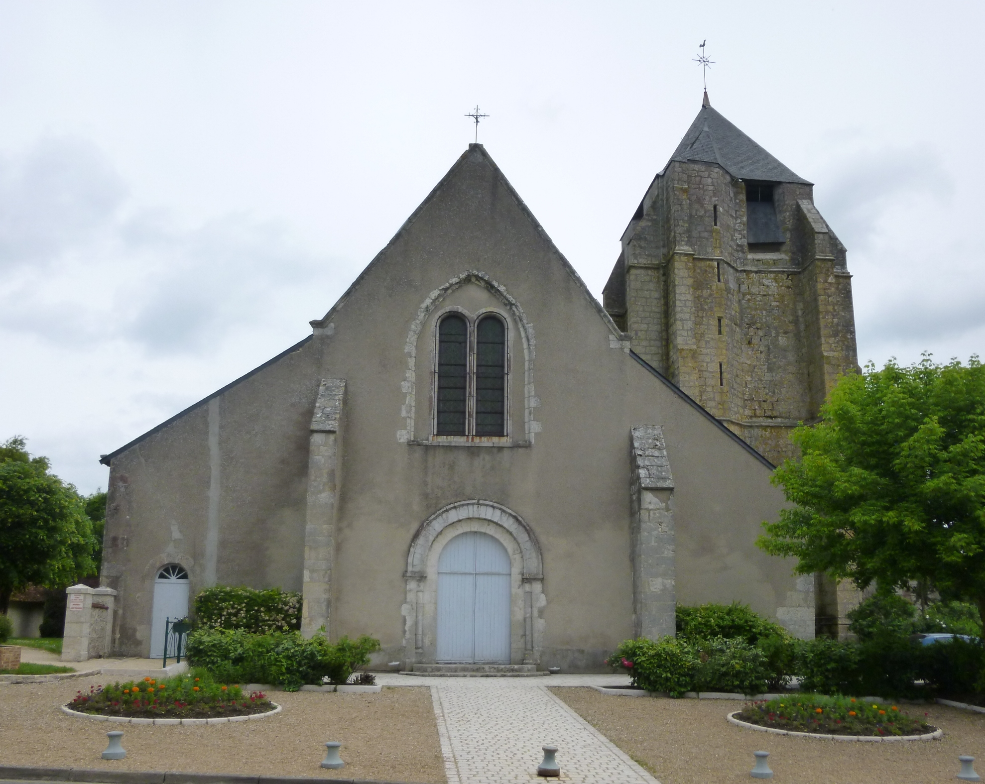 L' église